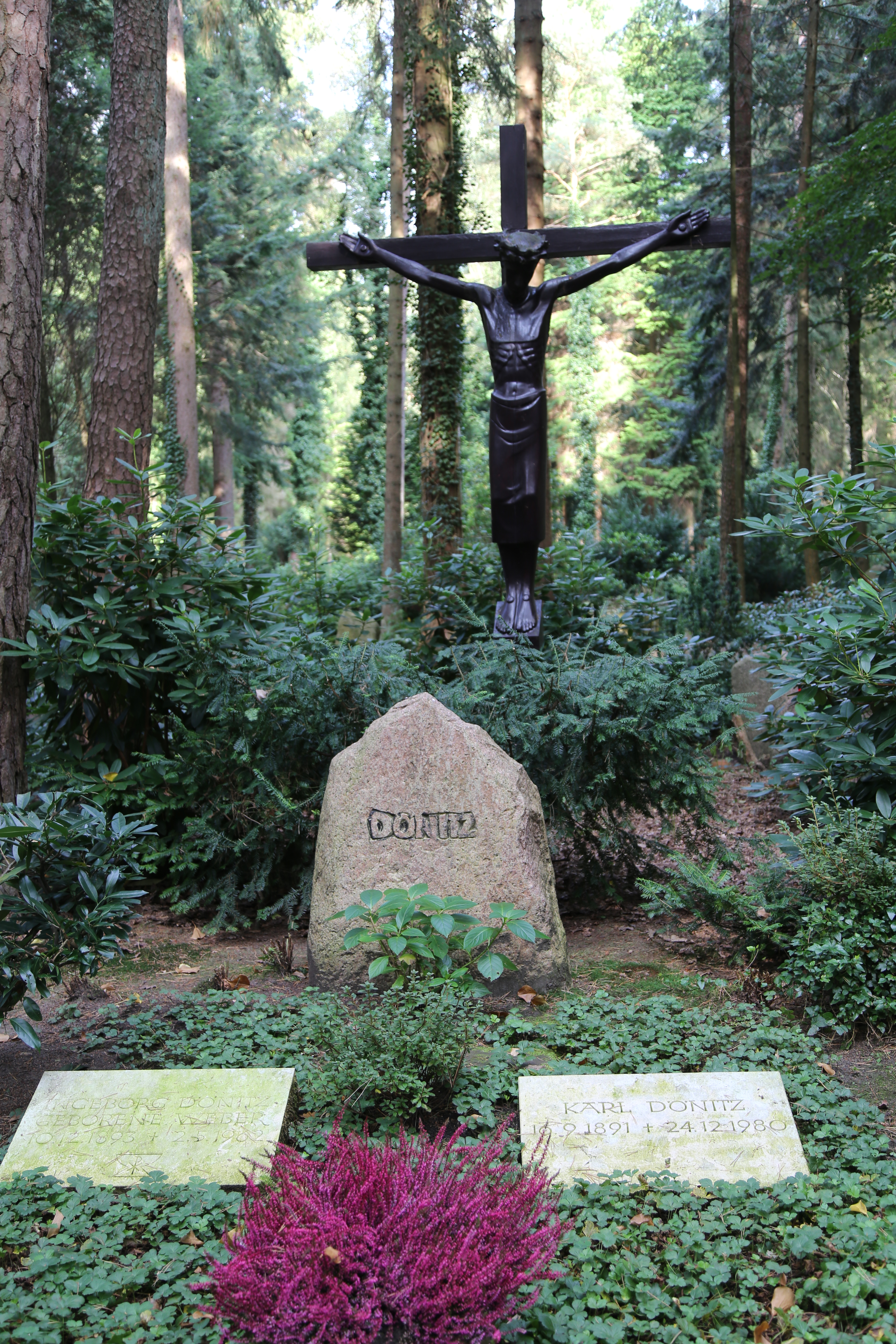 Karl Dönitz (* 16. September 1891 in Grünau bei Berlin; † 24. Dezember 1980 in Aumühle) war ein deutscher Marineoffizier (ab Januar 1943 Großadmiral), Nationalsozialist, NSDAP-Mitglied, enger Gefolgsmann Adolf Hitlers und letztes Staatsoberhaupt des Deutschen Reichs.